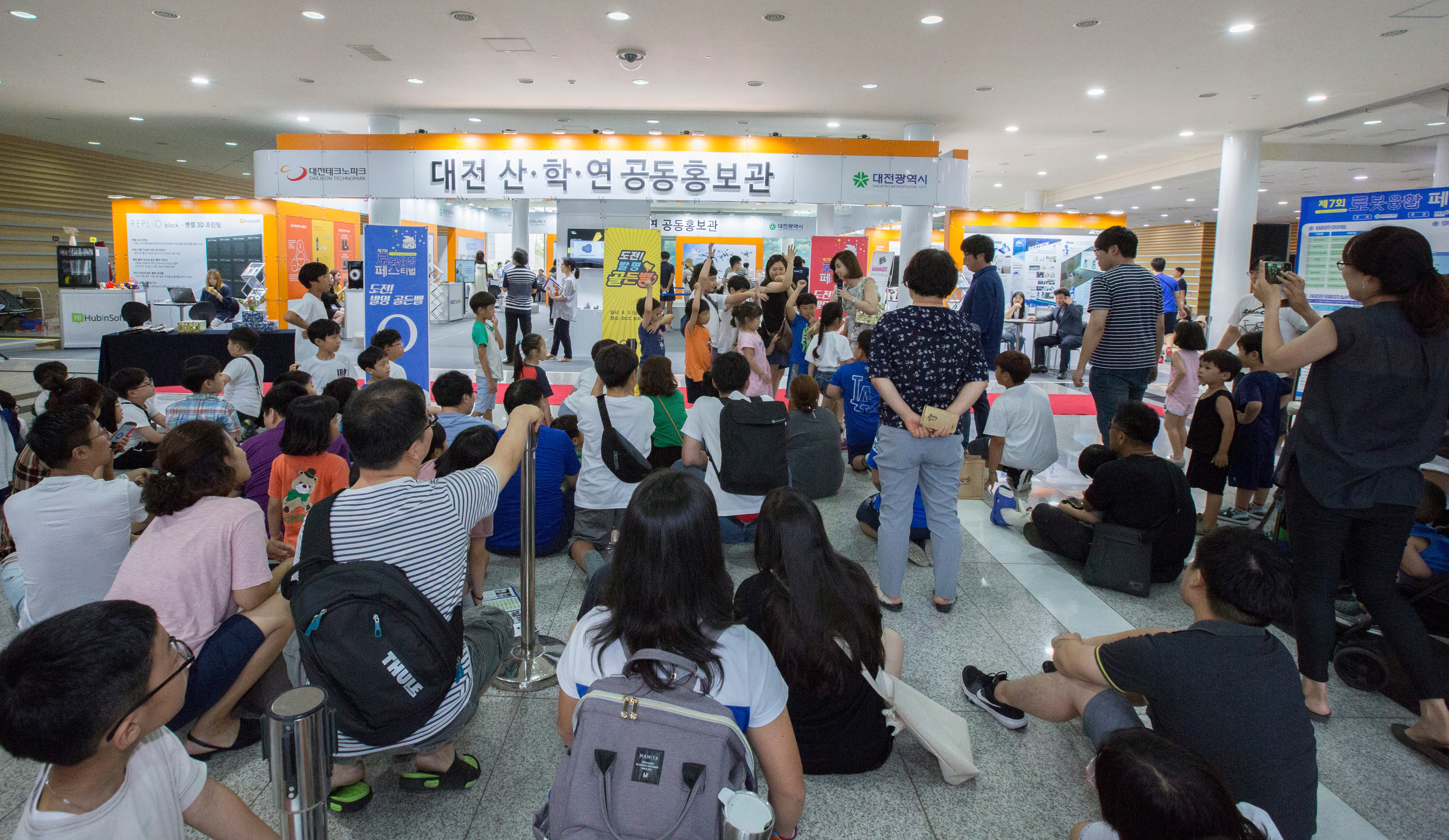 2018 대전로봇융합페스티벌 6